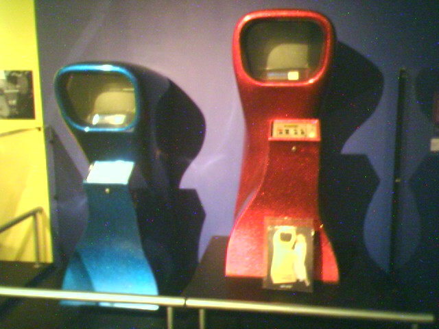 Computer Space, 1st arcade game 1971